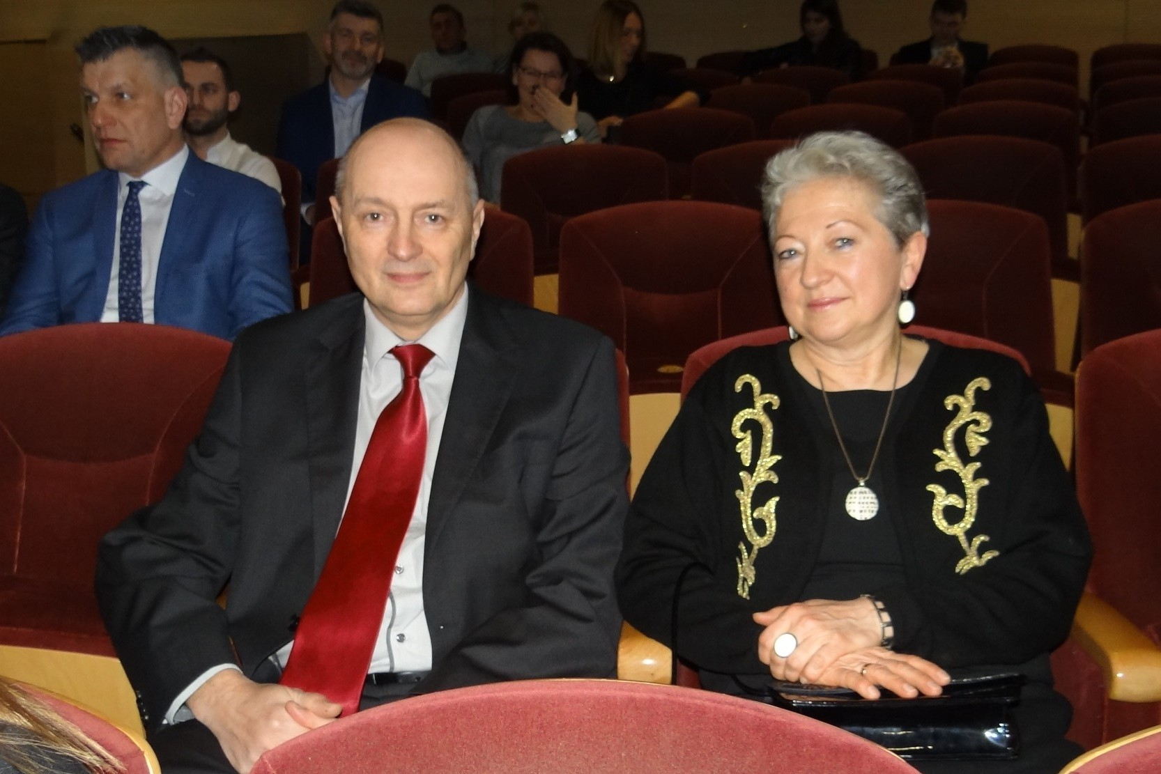 Prezes Spójni Tadeusz Gutowski z małżonką podczas gali